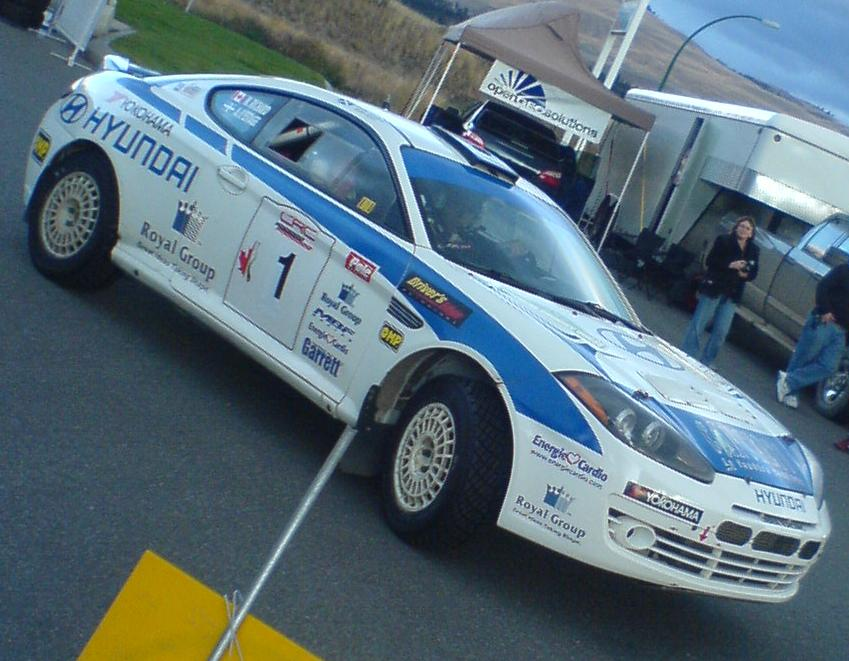 2007-2008 Hyundai Tiburon